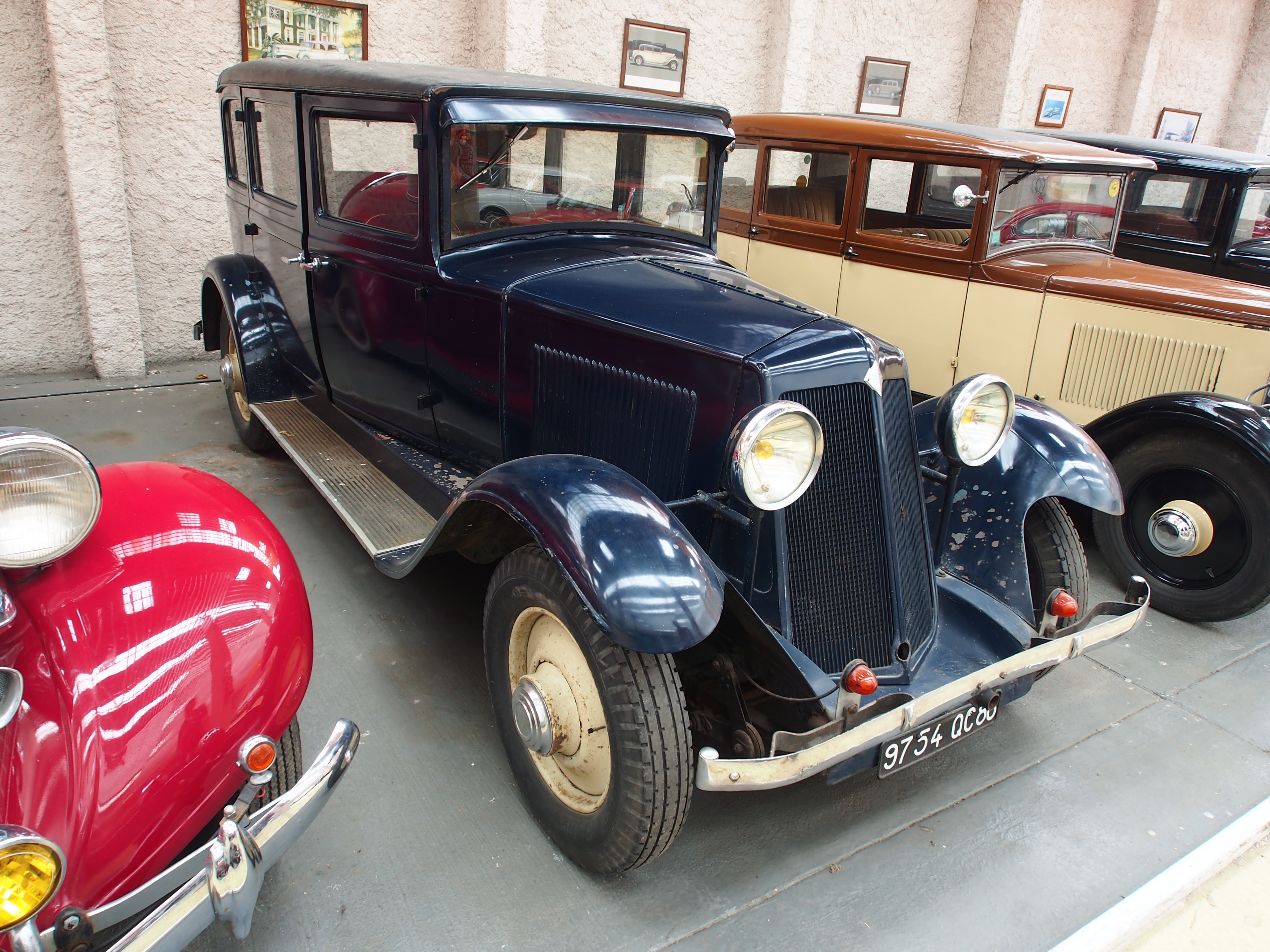 Photographed at the Association Lorraine des Amateurs d'Automobiles de collection et de loisirs.